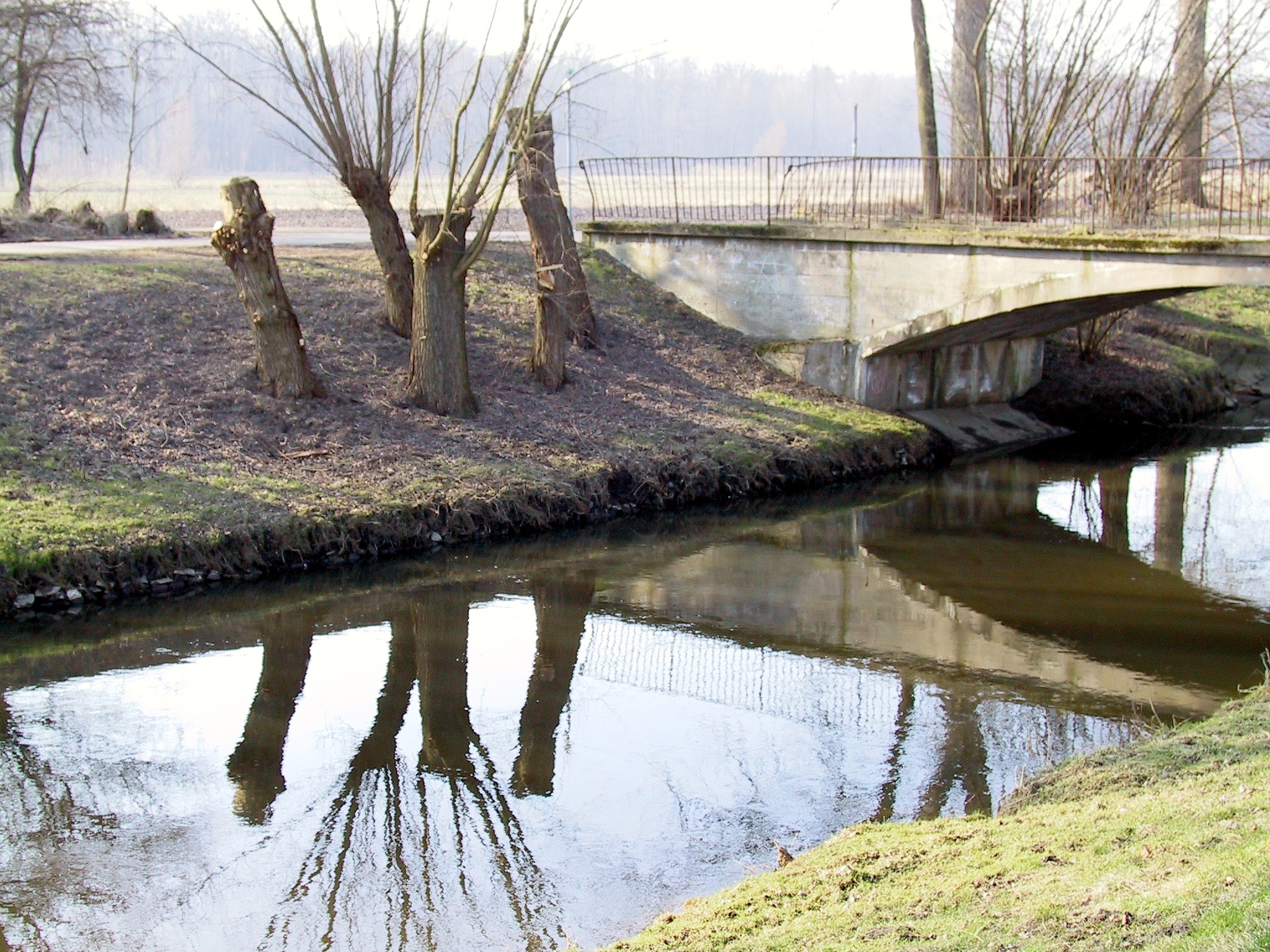 Die Niers bei Schiefbahn